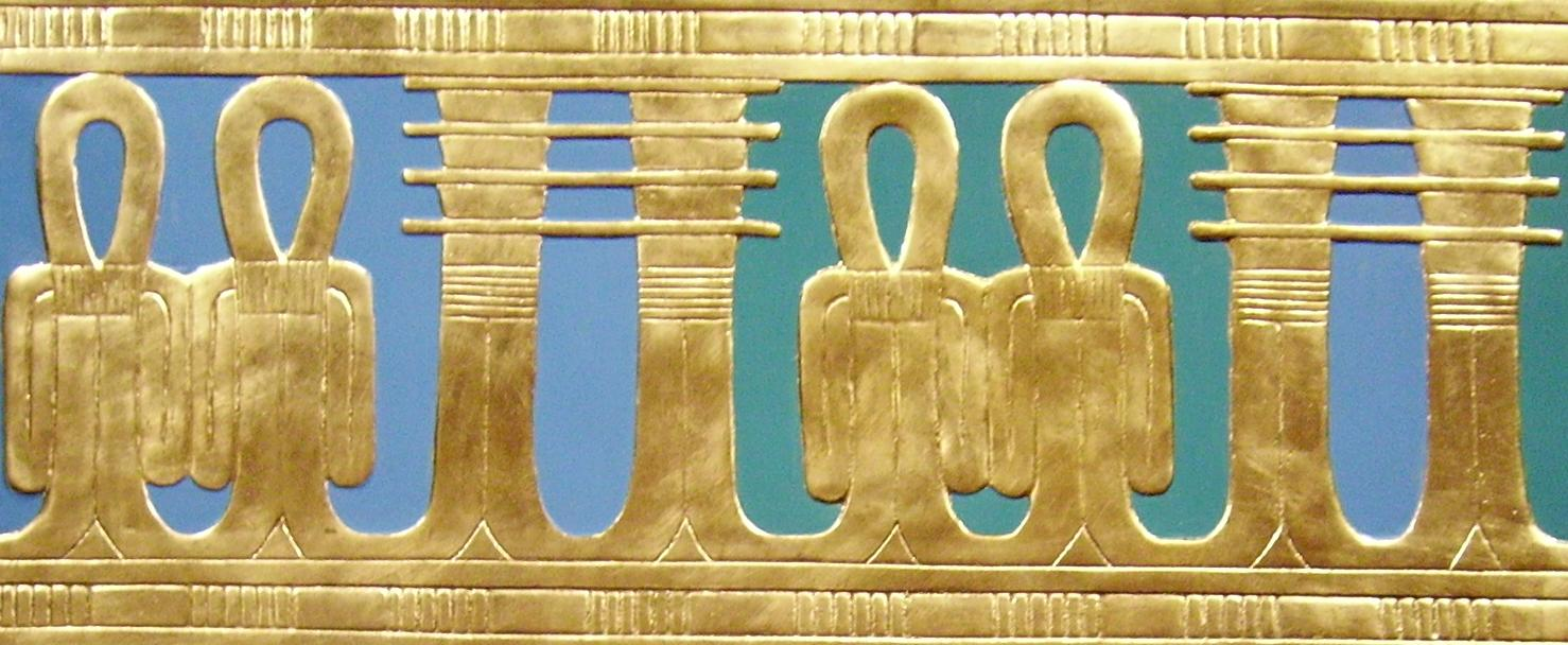 Motiv sloupu džed a uzlu tijet na vnější sarkofágové skříni z Tutanchamonovy hrobky; replika z výstavy Tutanchamon - jeho hrob a poklady. (Ancient Egyptian Tyet symbol, also known as the Isis knot)